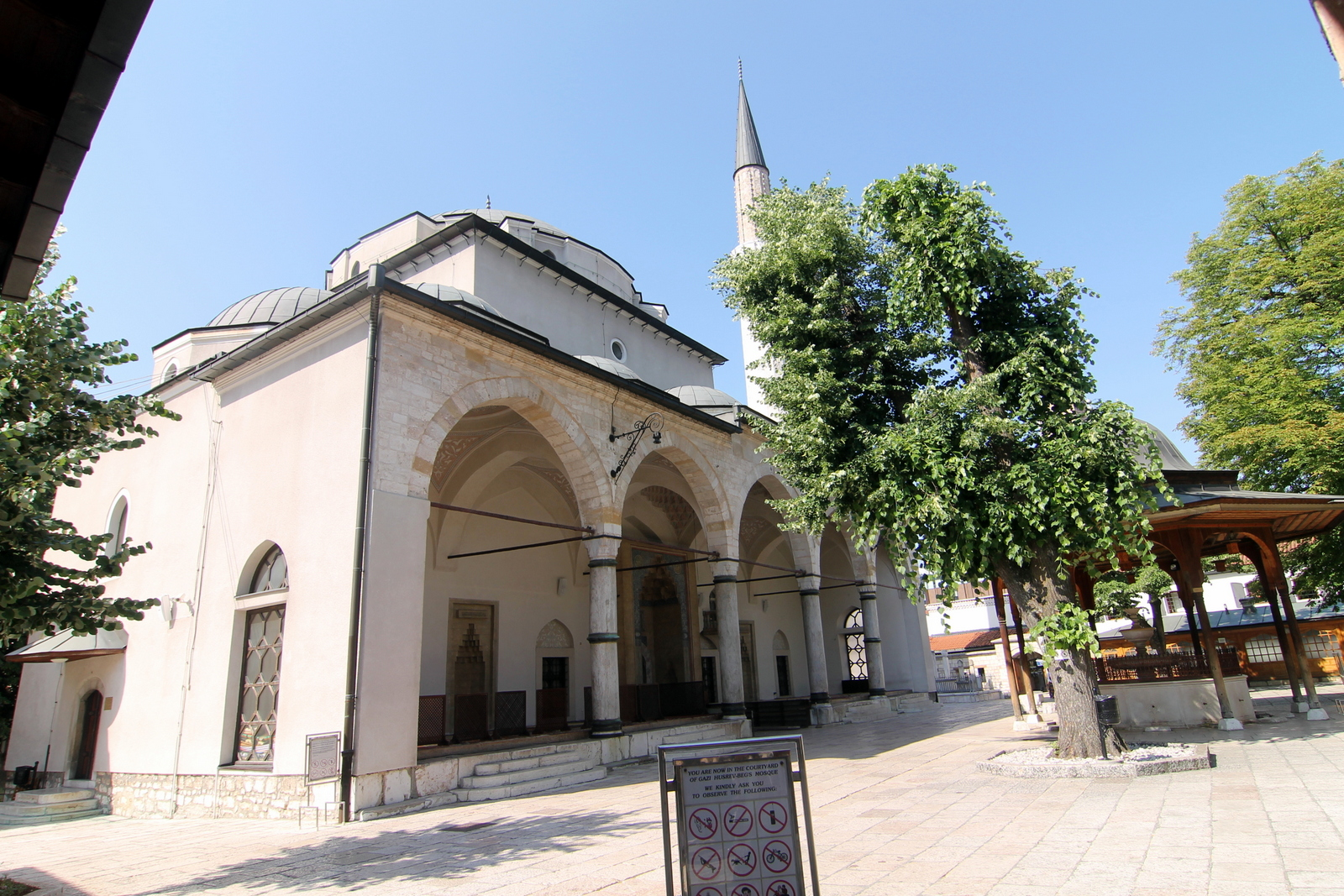 IMG_5547Bosznia_Szarajevo